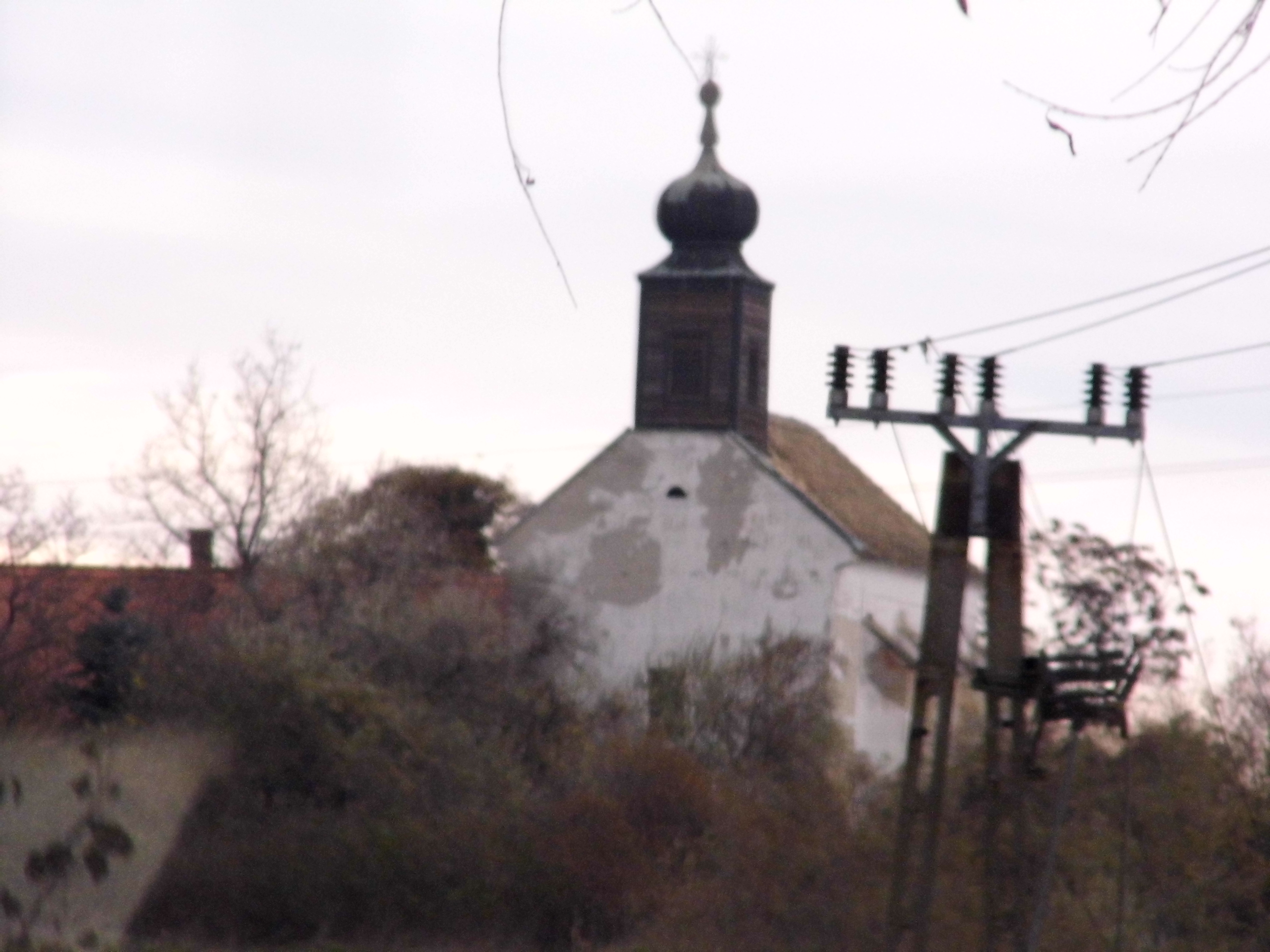 Műemlék kápolna, Etyrek- Botpuszta (régi nevén: Bot)